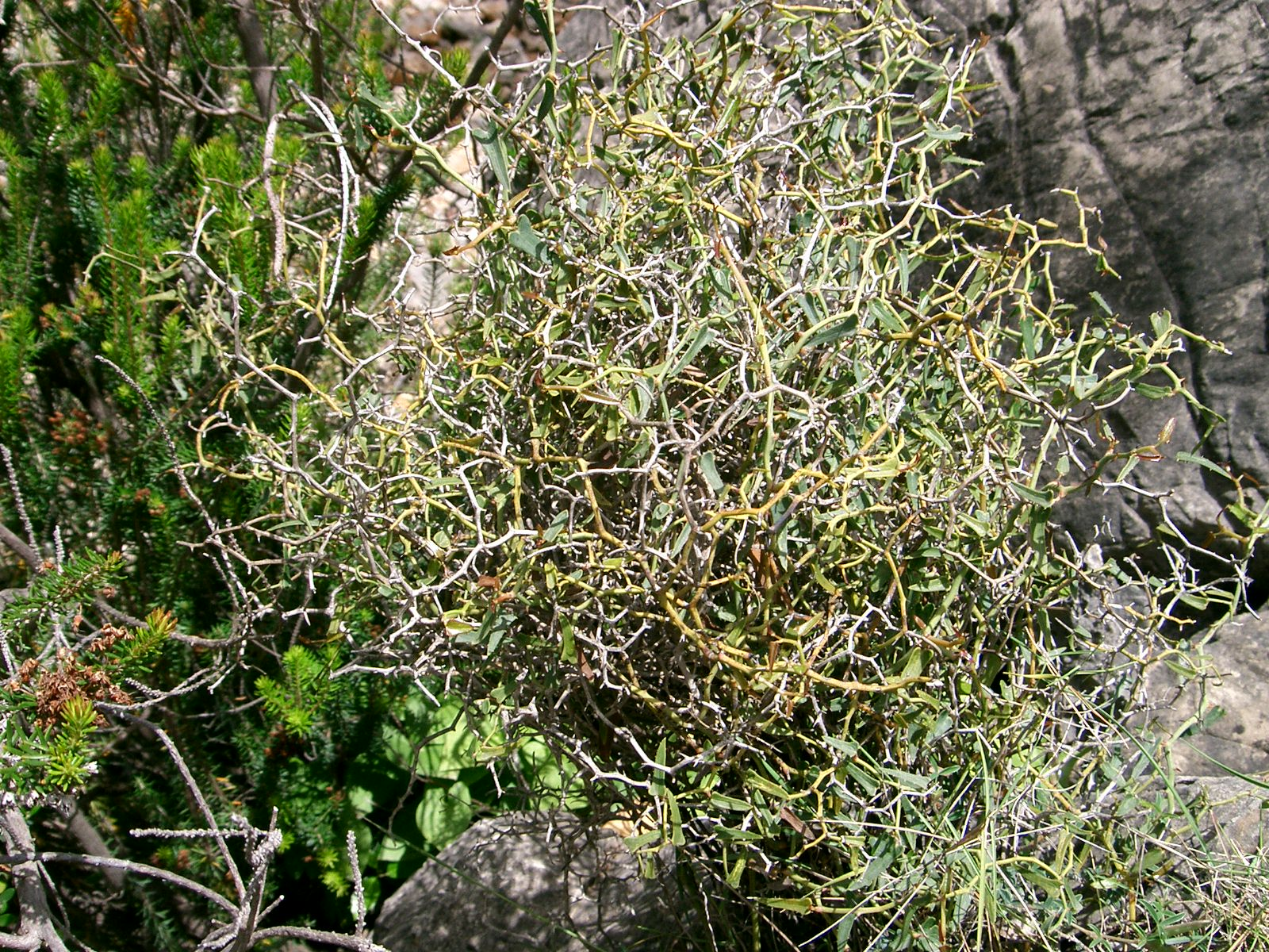 Aritja baleàrica, Smilax aspera ssp balearica. Photograph from Ca's Deco, Fornalutx, Mallorca.